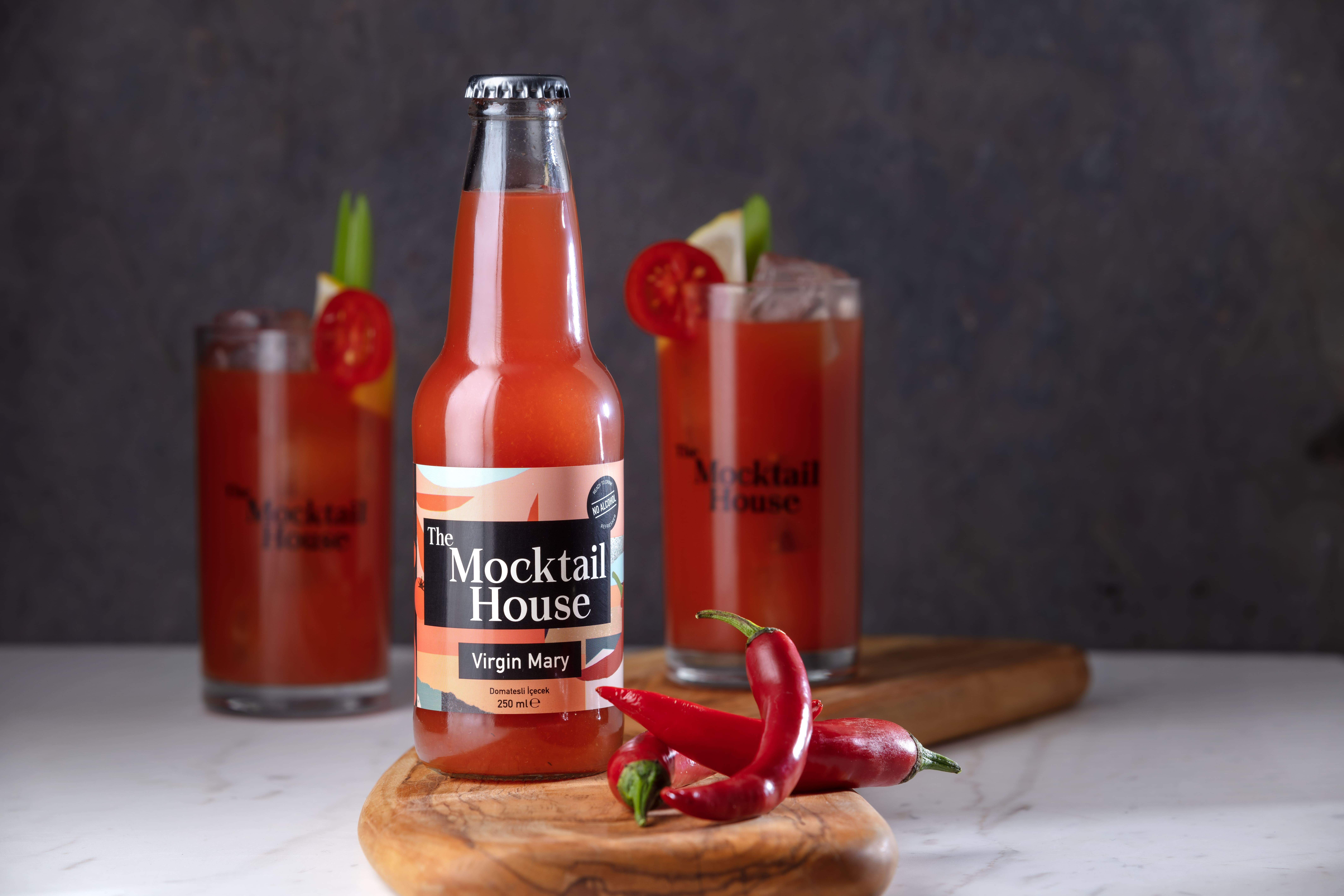 The Mocktail House - Vrigin Mary